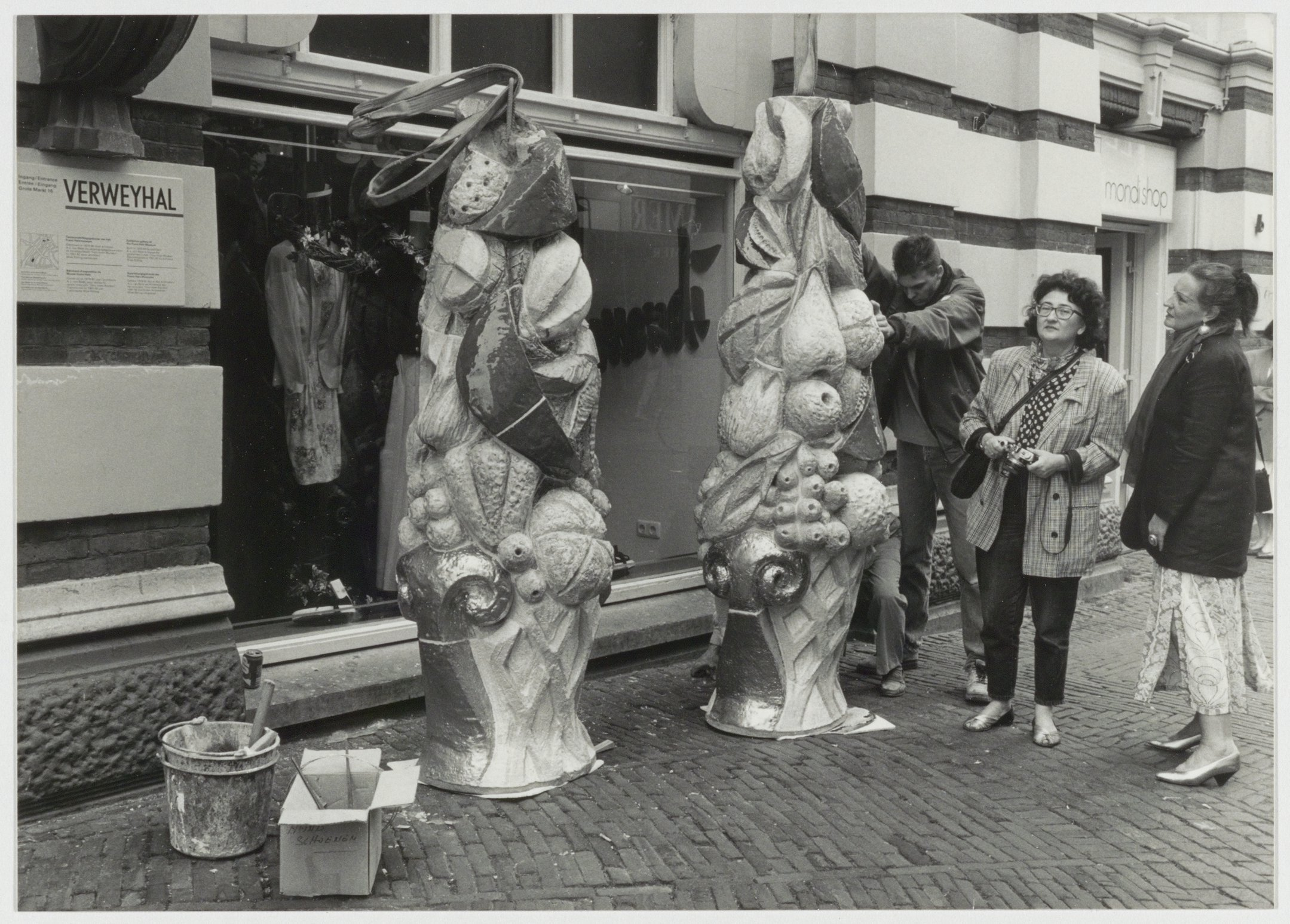 CollectieCollectie Fotoburo de BoerInventarisnummerNL-HlmNHA_54034150NL-HlmNHA_1478_38173kBeschrijvingKunstenares Dora Dolz ( midden) ziet toe hoe haar fruitsculpturen getiteld "Fata Morgana" in de gevelnissen van de Verweyhal worden getakeld.FotonummerNL-HlmNHA_1478_2585DocumenttypeHistorieprenten, tekeningen en foto'sVervaardigerHendriks, Rob (UP De Boer) Soort vervaardigerFotograaf AnnotatiesHD 260593PersonenDolz, Dora Functies personenkunstenaar LandNederland ProvincieNoord-Holland GemeenteHaarlem PlaatsHaarlem StraatGrote Houtstraat Begindatum05-1993Einddatum05-1993TechniekFoto Trefwoordenkunst en cultuur